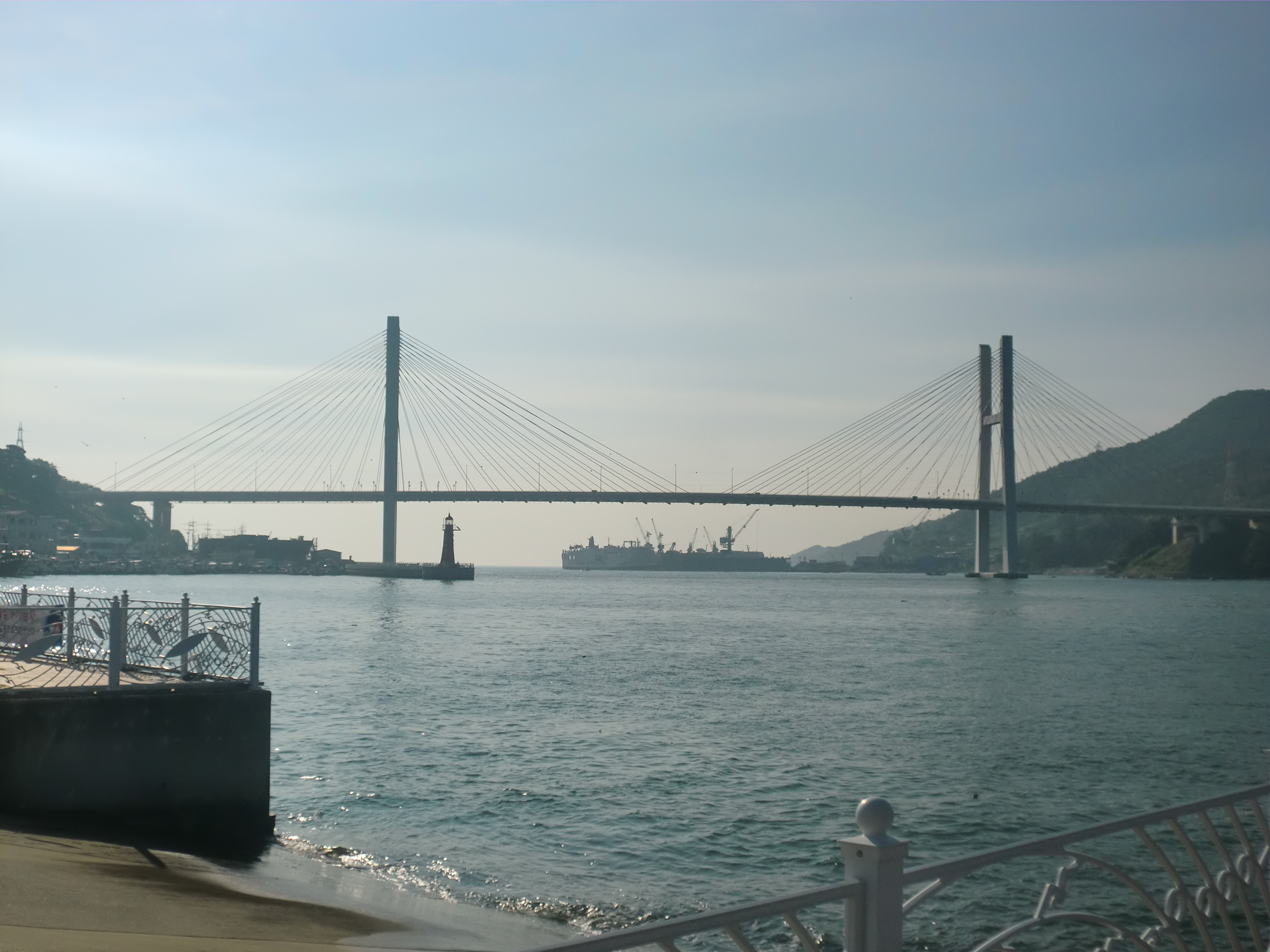 전라남도 여수시에 있는 거북선대교